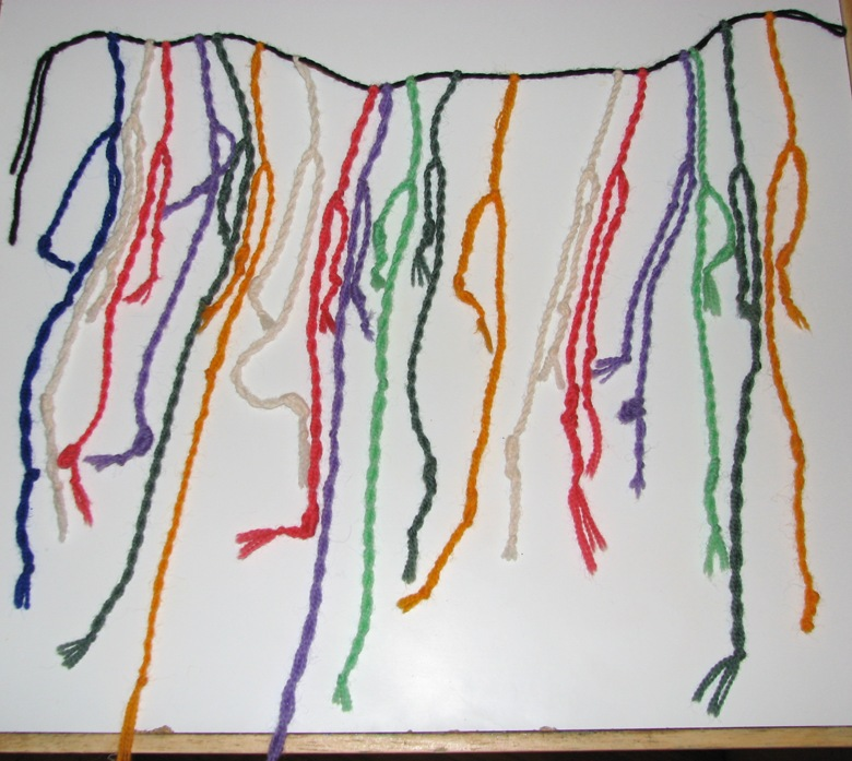 Los QUIPUS (se pronuncia kipus) era un sistema de registro de información numérico y mnemotécnico creado por los Incas, antiguos pobladores de América del Sur (Perú, Ecuador, Bolivia y parte de Colombia, Chile y Argentina). El quipu constaba de un cordel horizontal del cual pendían varias cuerdas delgadas trenzadas. Estas eran de diferentes tamaños y en ellas se habían ejecutado grupos de nudos situados a intervalos distintos.